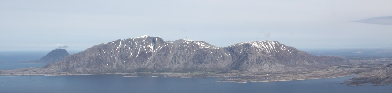 Øya Vega sett fra sør-sørøst